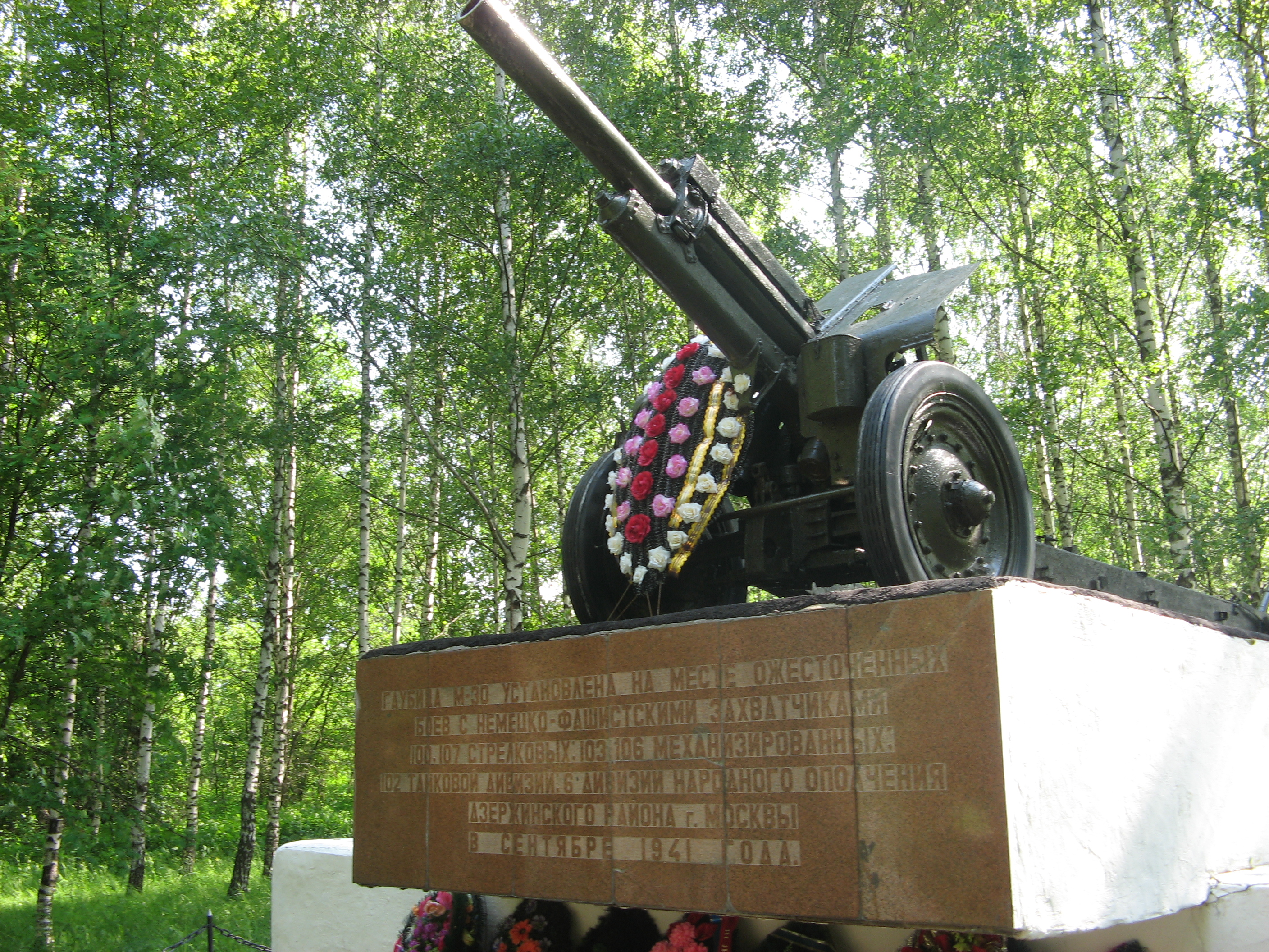 Гаубица М-30 на постаменте на месте ожесточённых боёв с гитлеровскими войсками